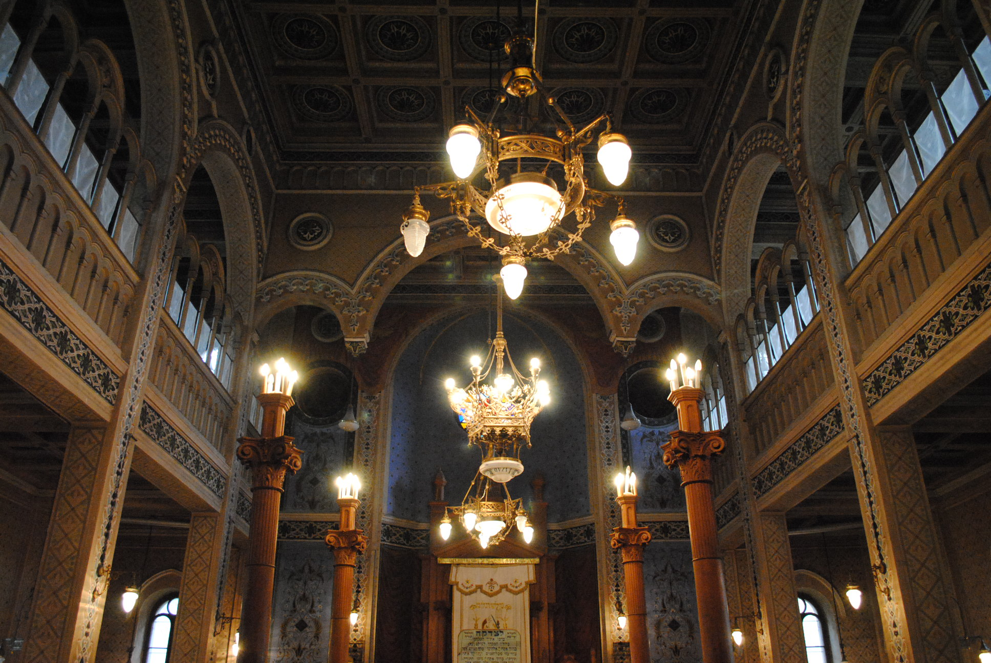 Sinagogă, 1898 - 1899